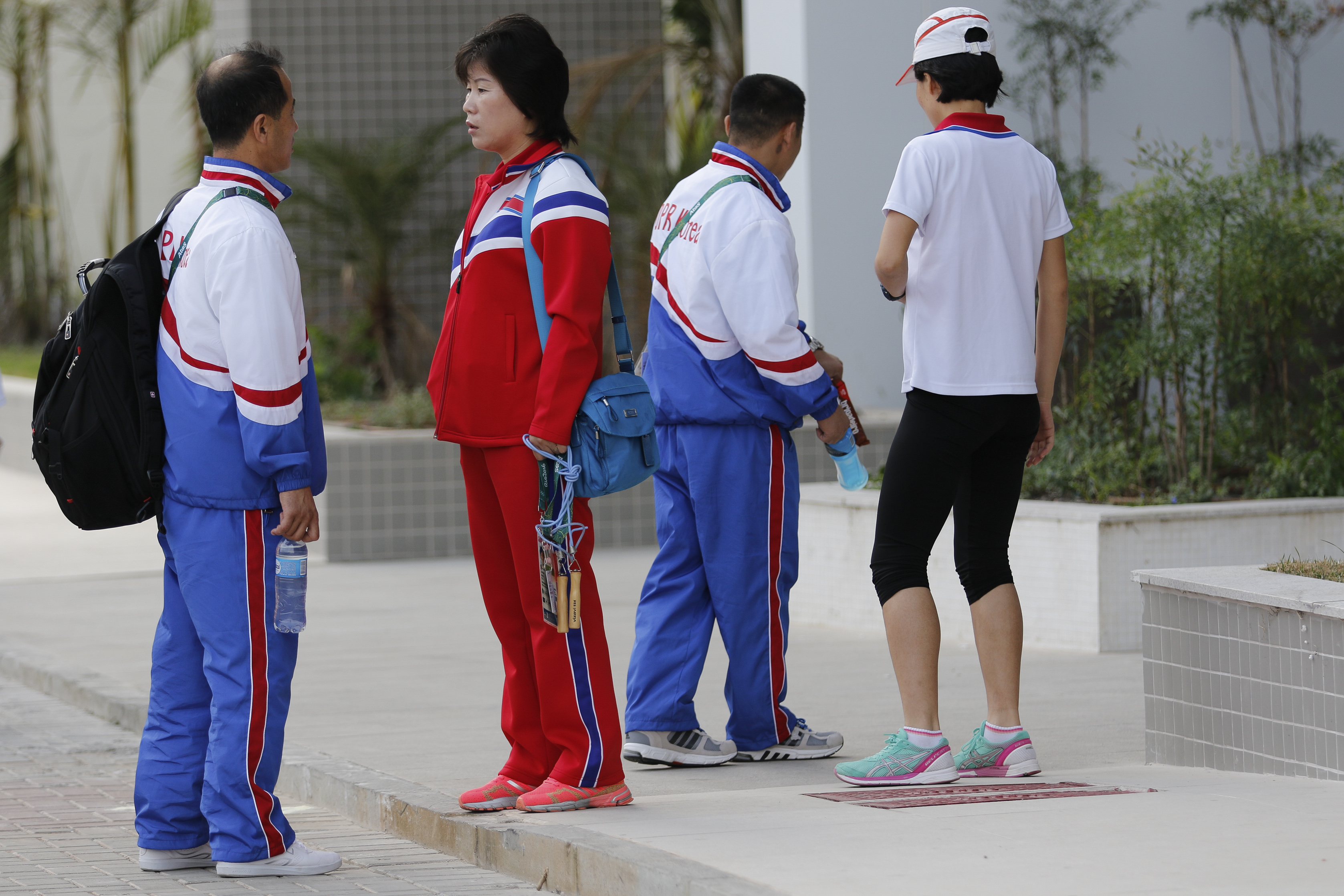 Rio de Janeiro - Representantes da Coréia do Norte na área residencial da Vila Olímpica dos Jogos Rio 2016, onde estão hospedados os atletas. (Foto: Fernando Frazão/Agência Brasil)